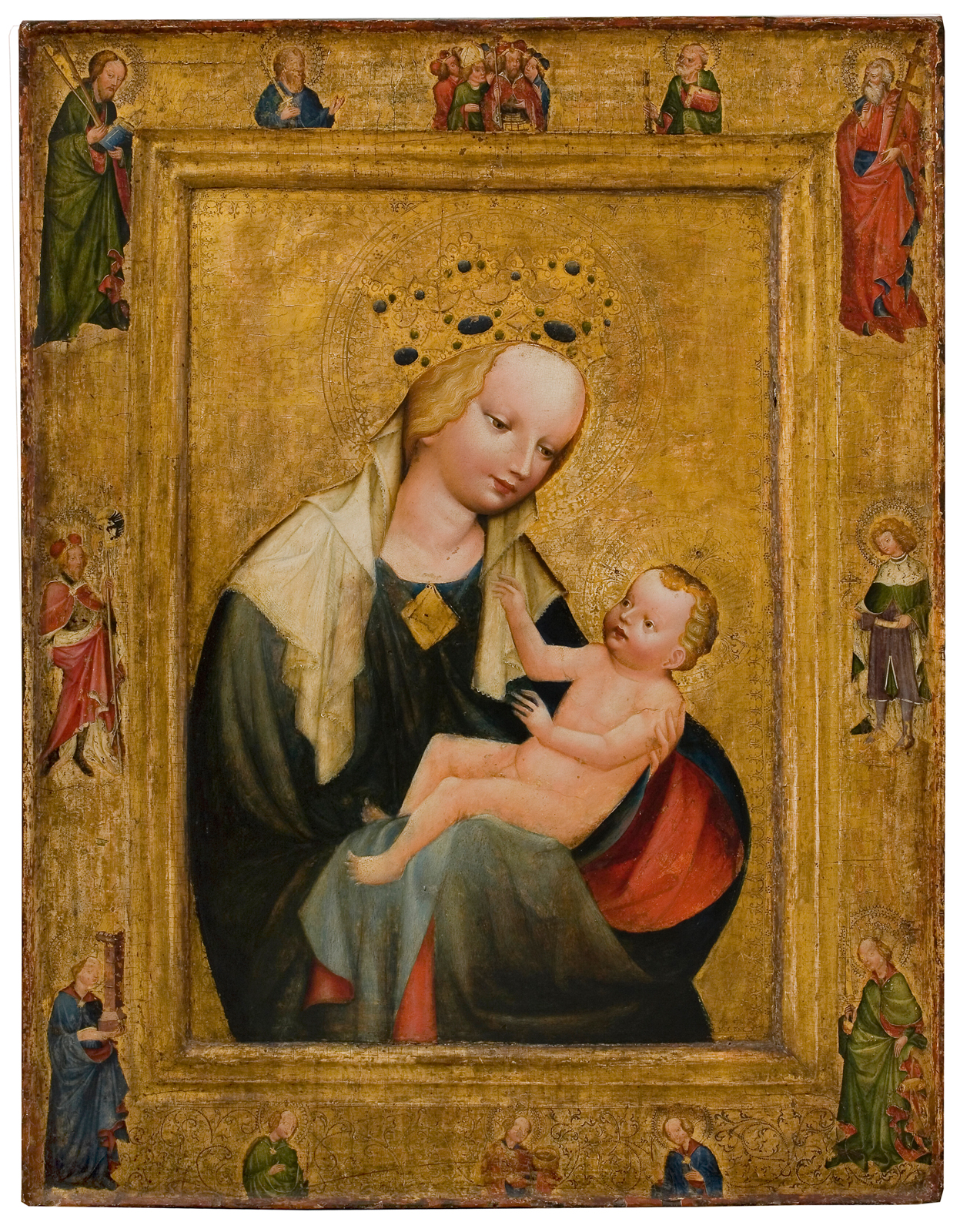 Madona svatotrojická, Alšova jihočeská galerie v Hluboké nad Vltavou